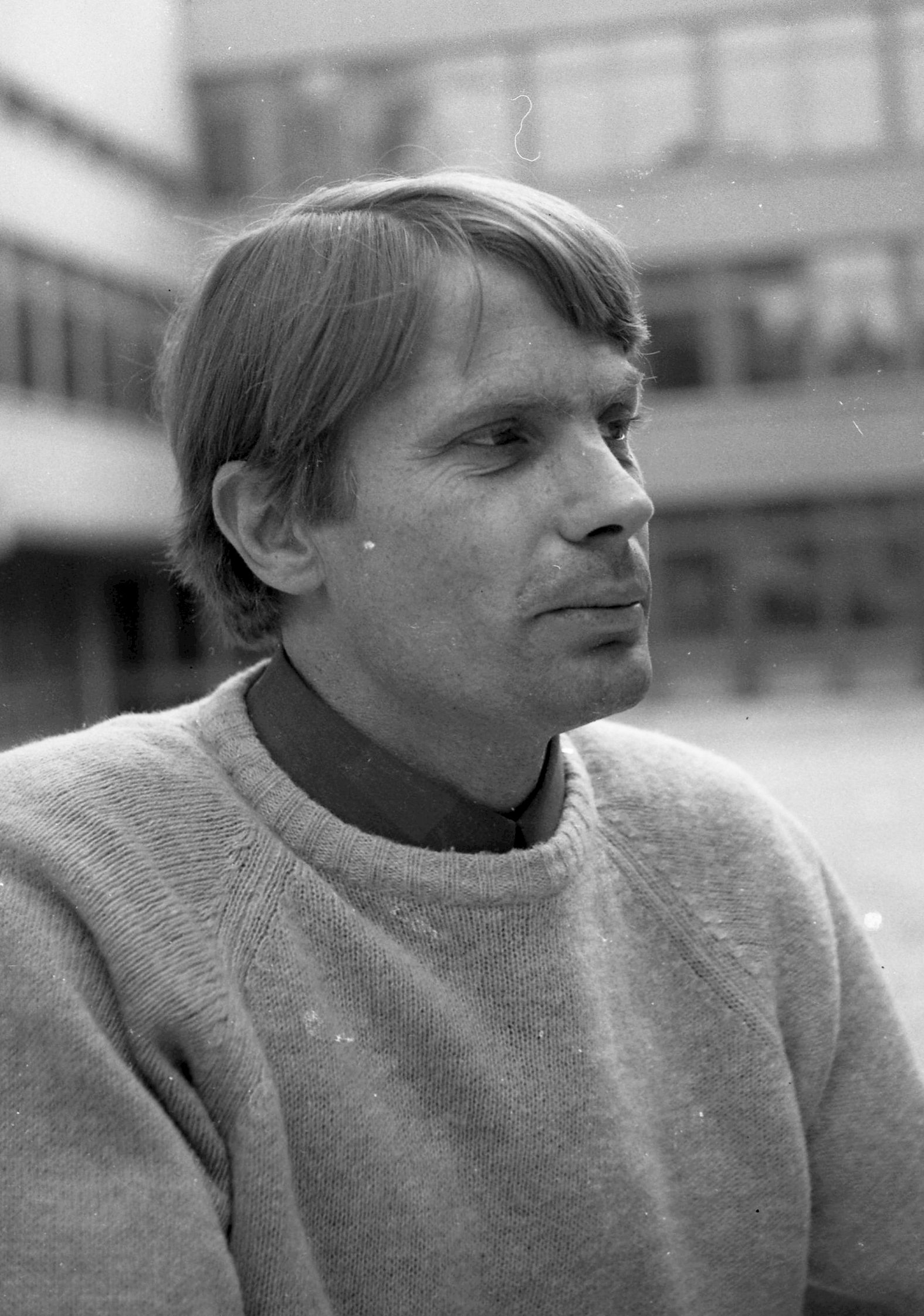 Melocco Miklós szobrászművész Szentendrén